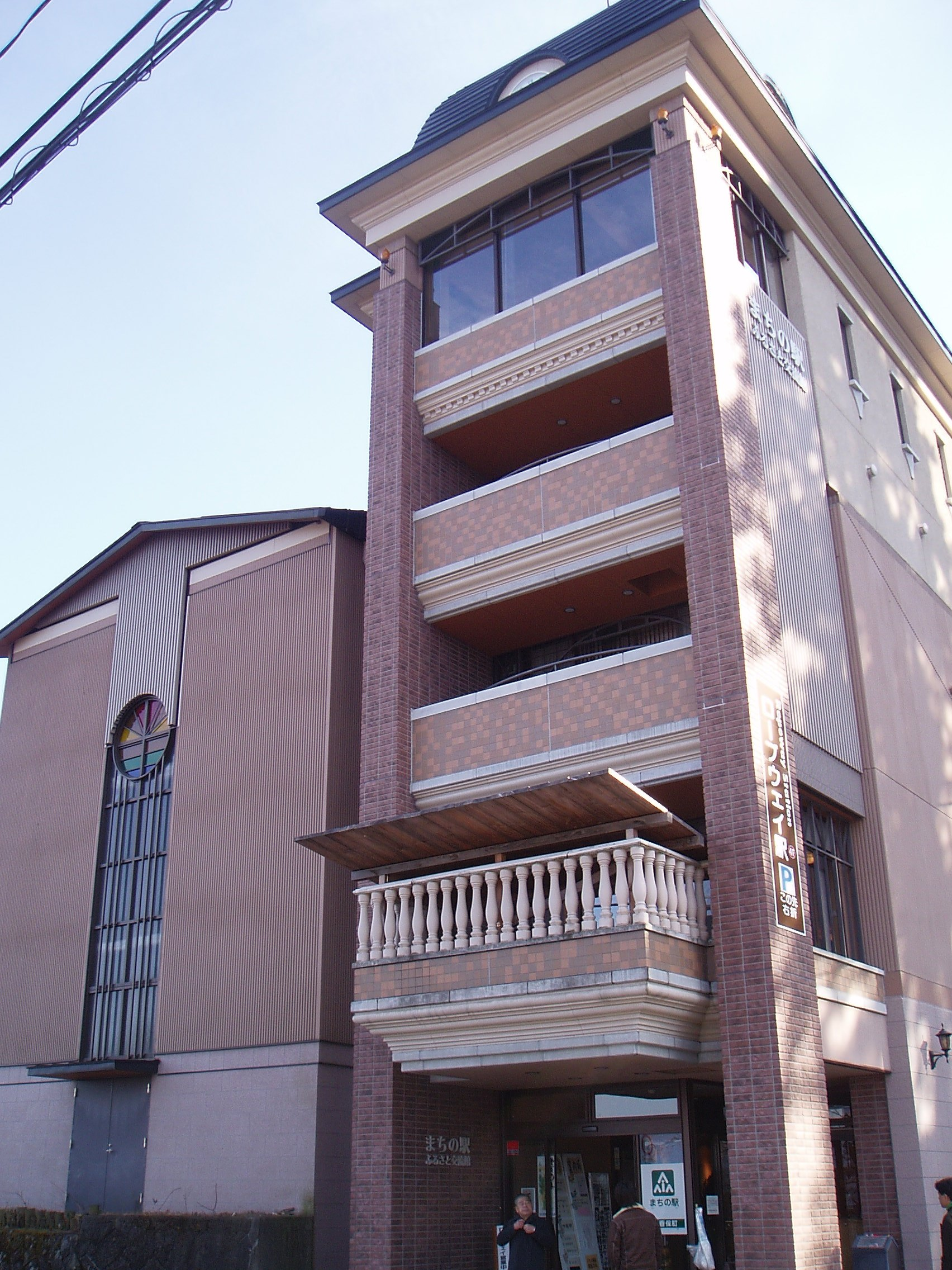 まちの駅ふるさと交通館